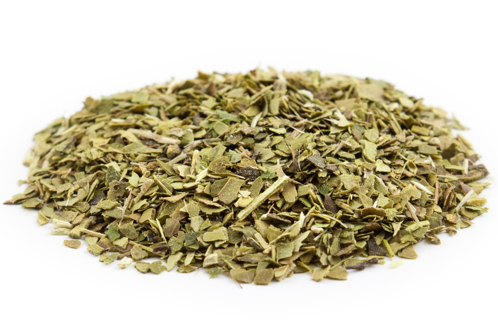 Grüner Mate (auch Yerba Mate) geschnitten